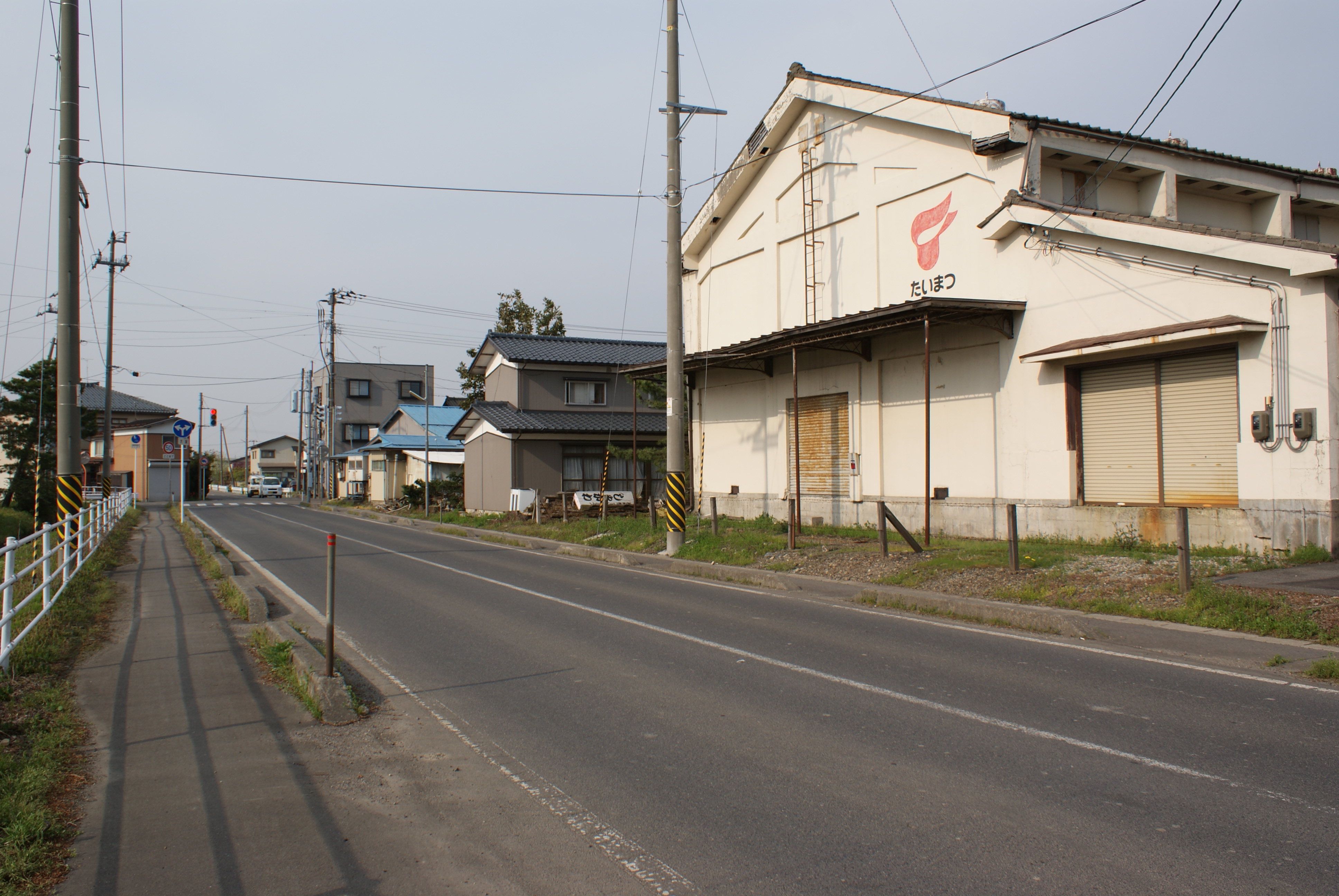 旧蒲原鉄道西村松駅跡。３階建ての建物の脇が駅跡。